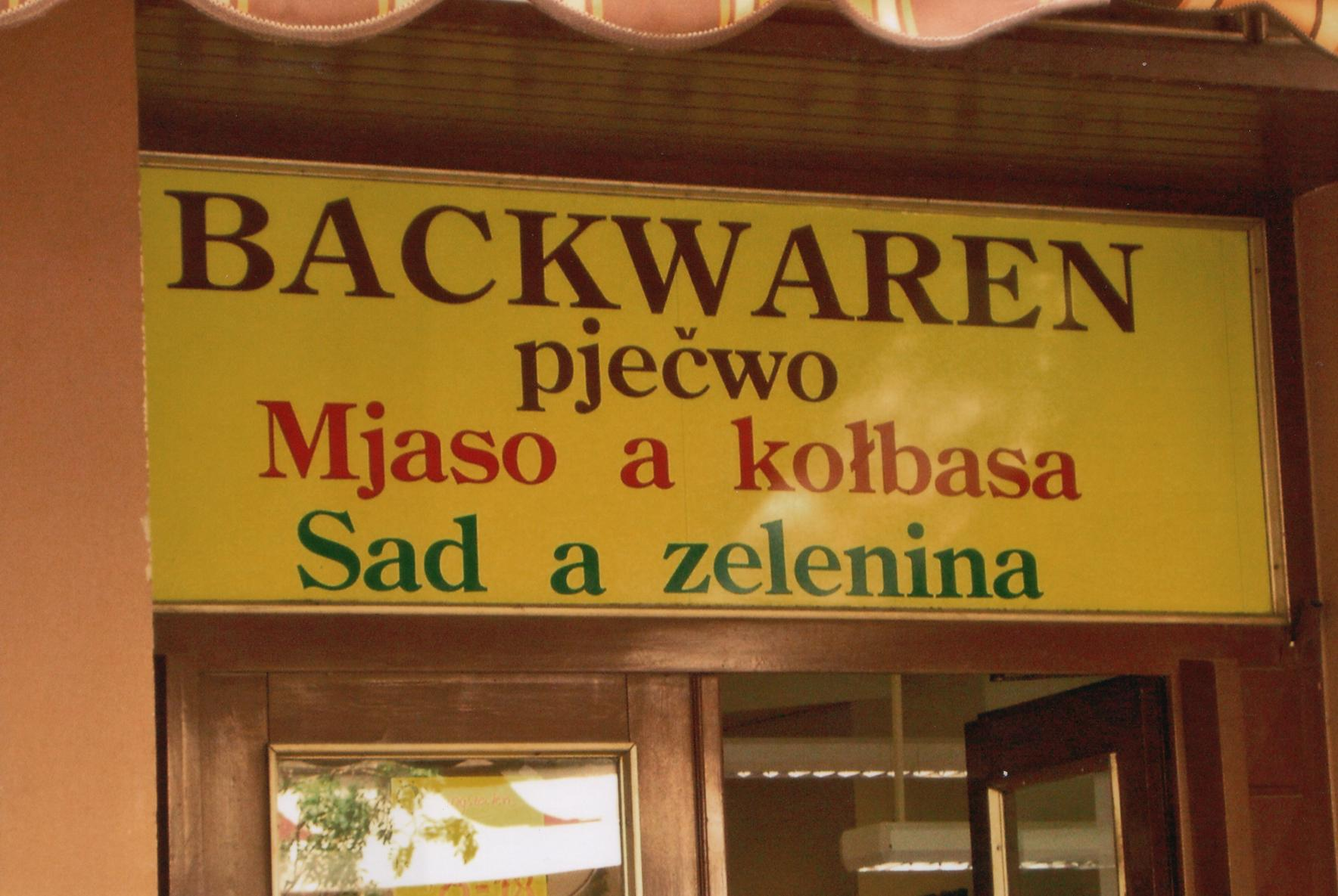 Zweisprachige Beschriftung an einem Laden in der Bautzener Karl-Marx-Straße.